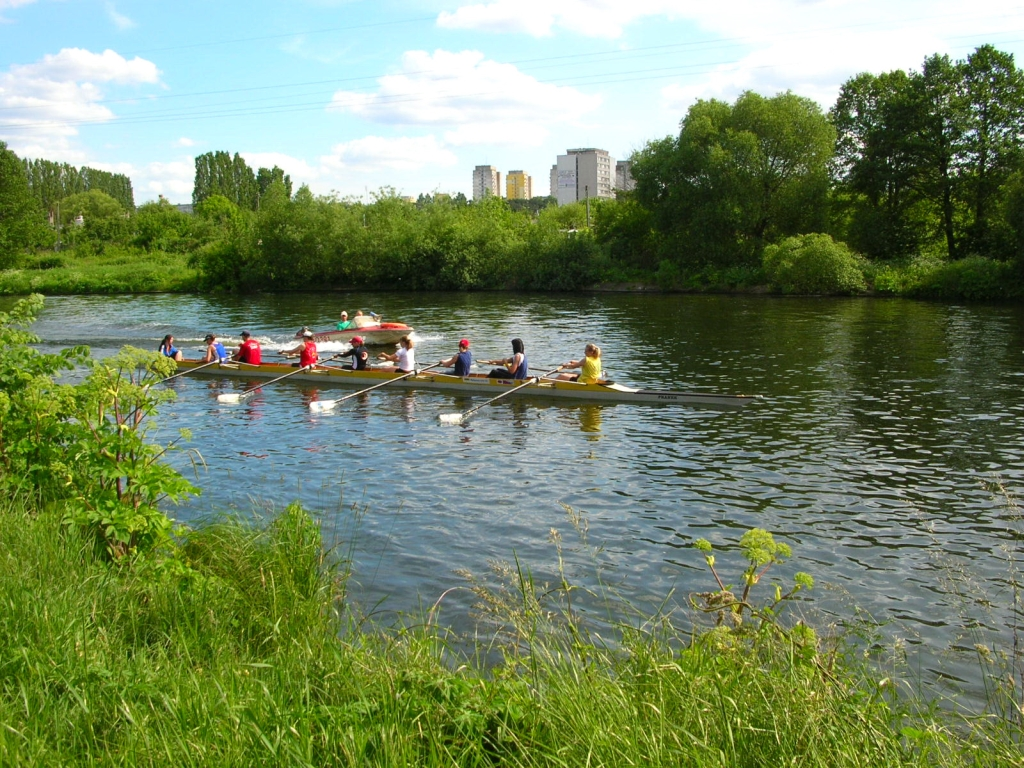 Brda na granicy osiedli Bartodzieje i Kapuściska w Bydgoszczy